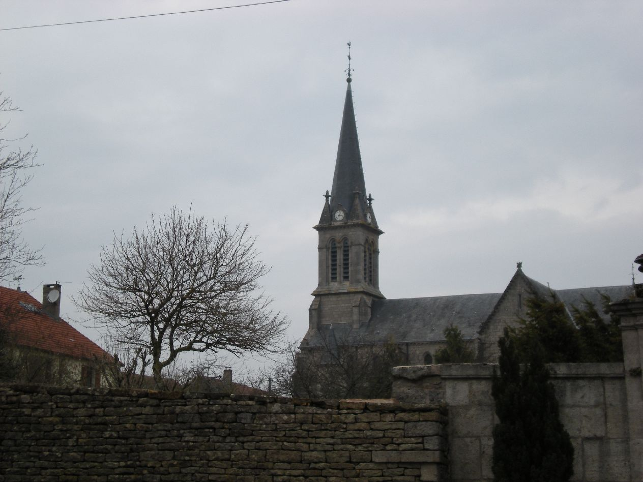 église de BOURG ( haute marne )